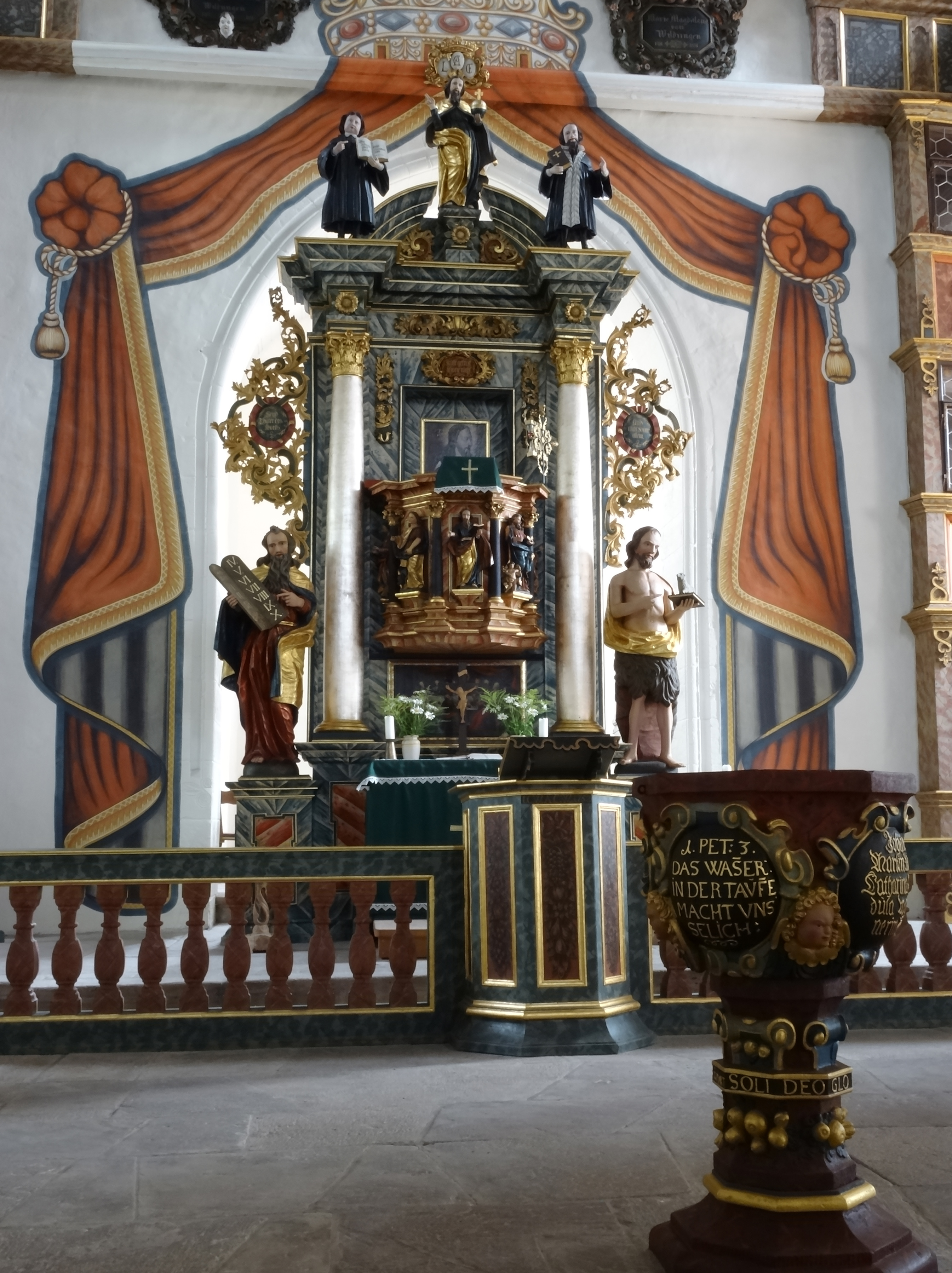 Der barocke Kanzelaltar wird flankiert von den Figuren Moses und Johannes des Täufers. An der Kanzelbrüstung die vier Evangelisten. Auf dem Altar Luther und Melanchthon neben Christus.